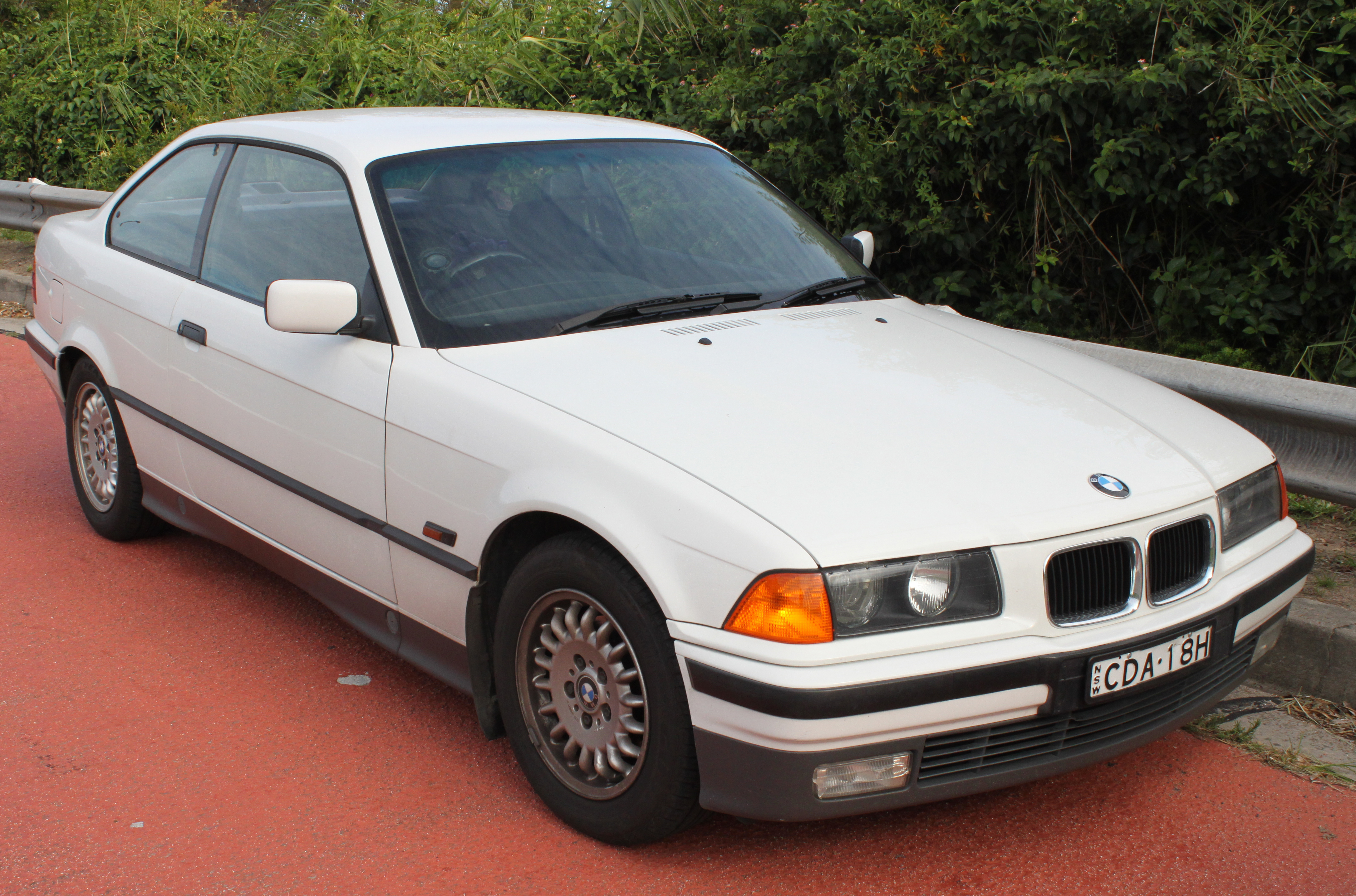 BMW E36 318is